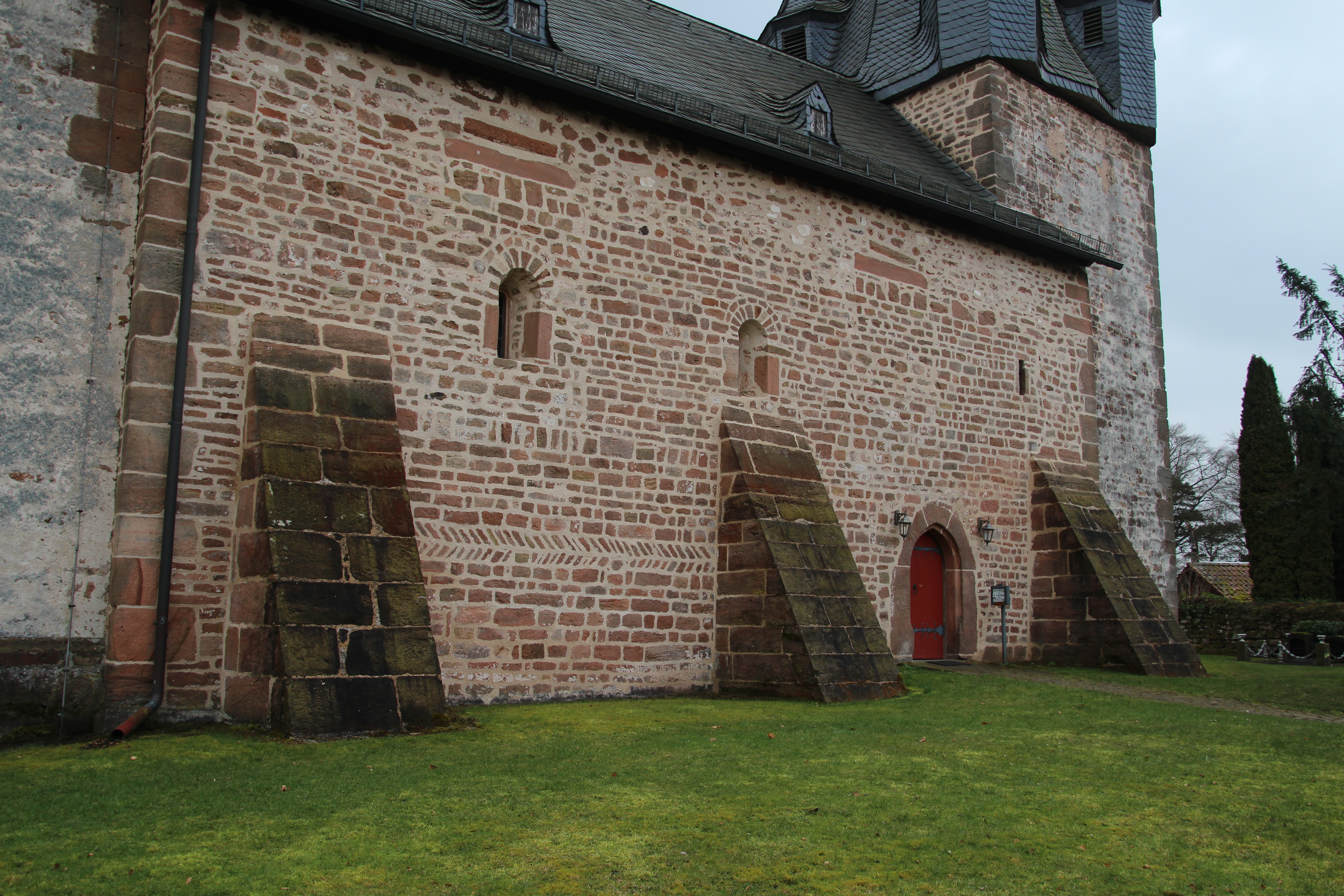 Christenberg